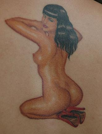 Detail: Tattoo inspired by Bettie Page (Kopie van DSC_6897)